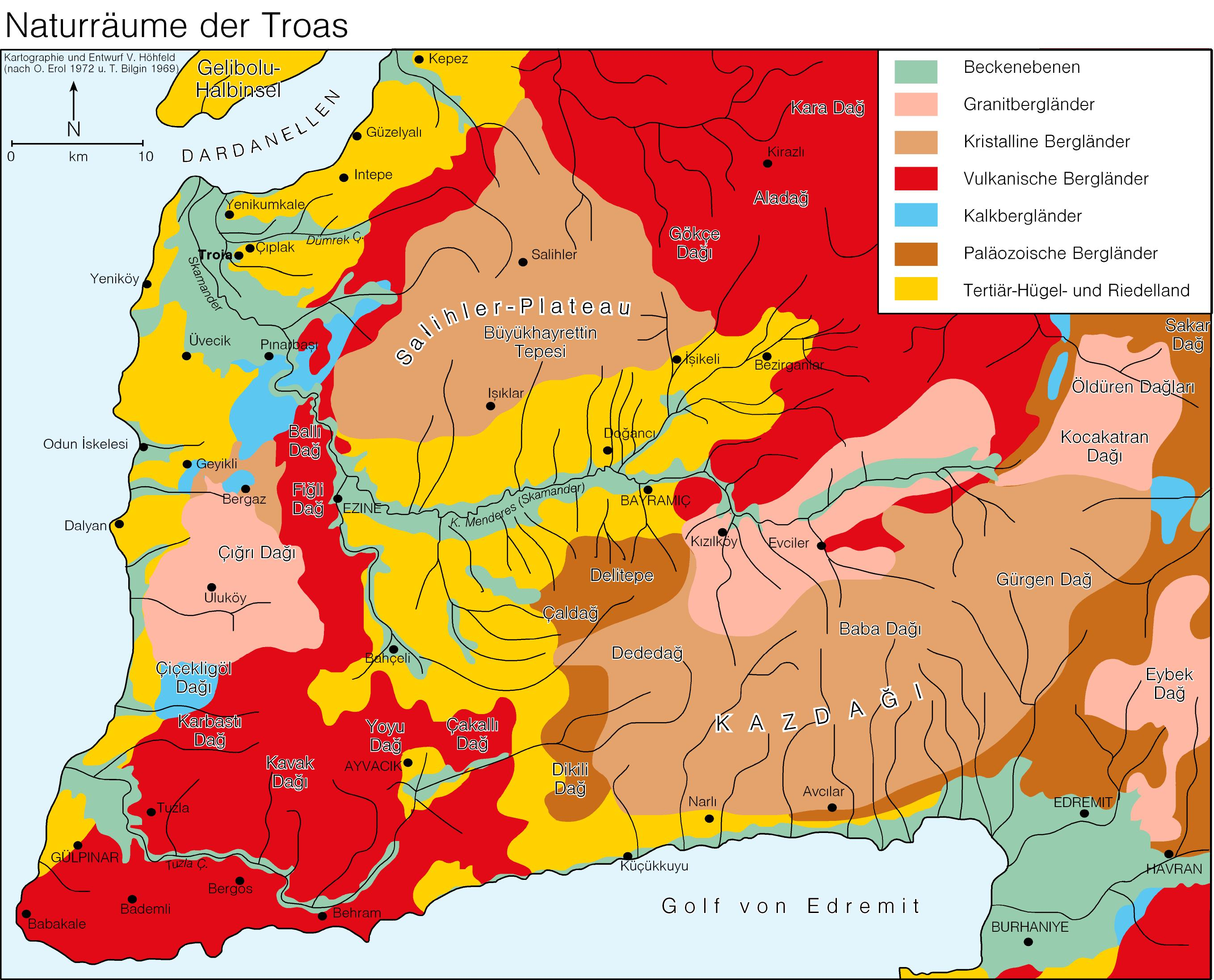 Die Karte zeigt die einzelnen Haupt-Naturräume der Troas anhand ihrer tektonischen, morphologischen bzw. geologischen Besonderheiten